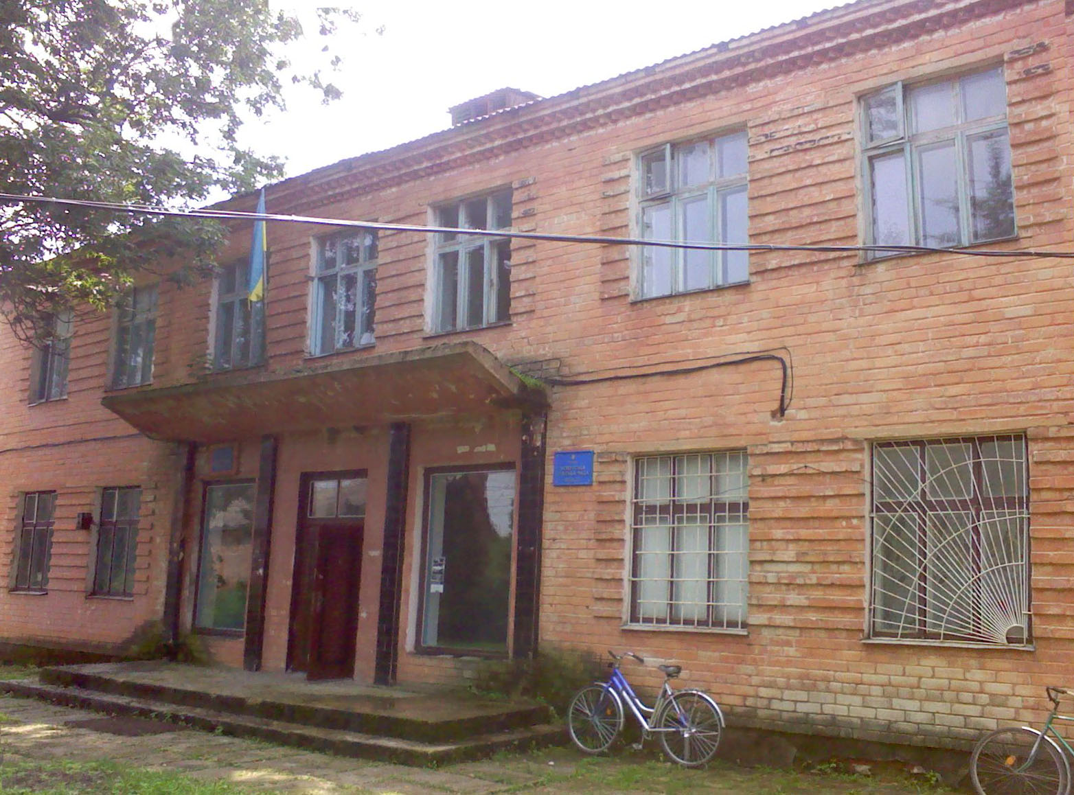 Будівля Мощенської сільської ради